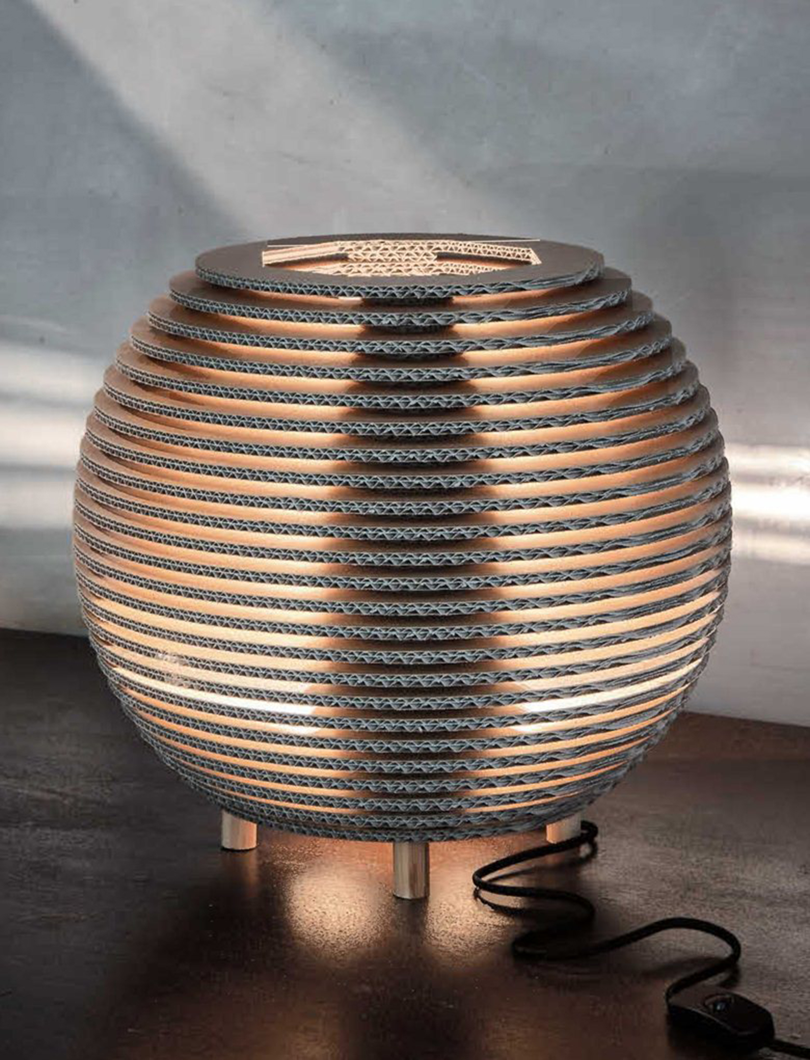 Lampada Bibbi